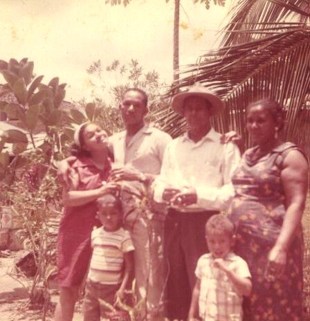 miembros del Clan los Peña (Marcelino Peña al lado de su conyuge Eustasia Verdú, del lado derecho